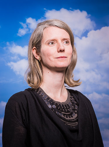 Katrin Wegemann